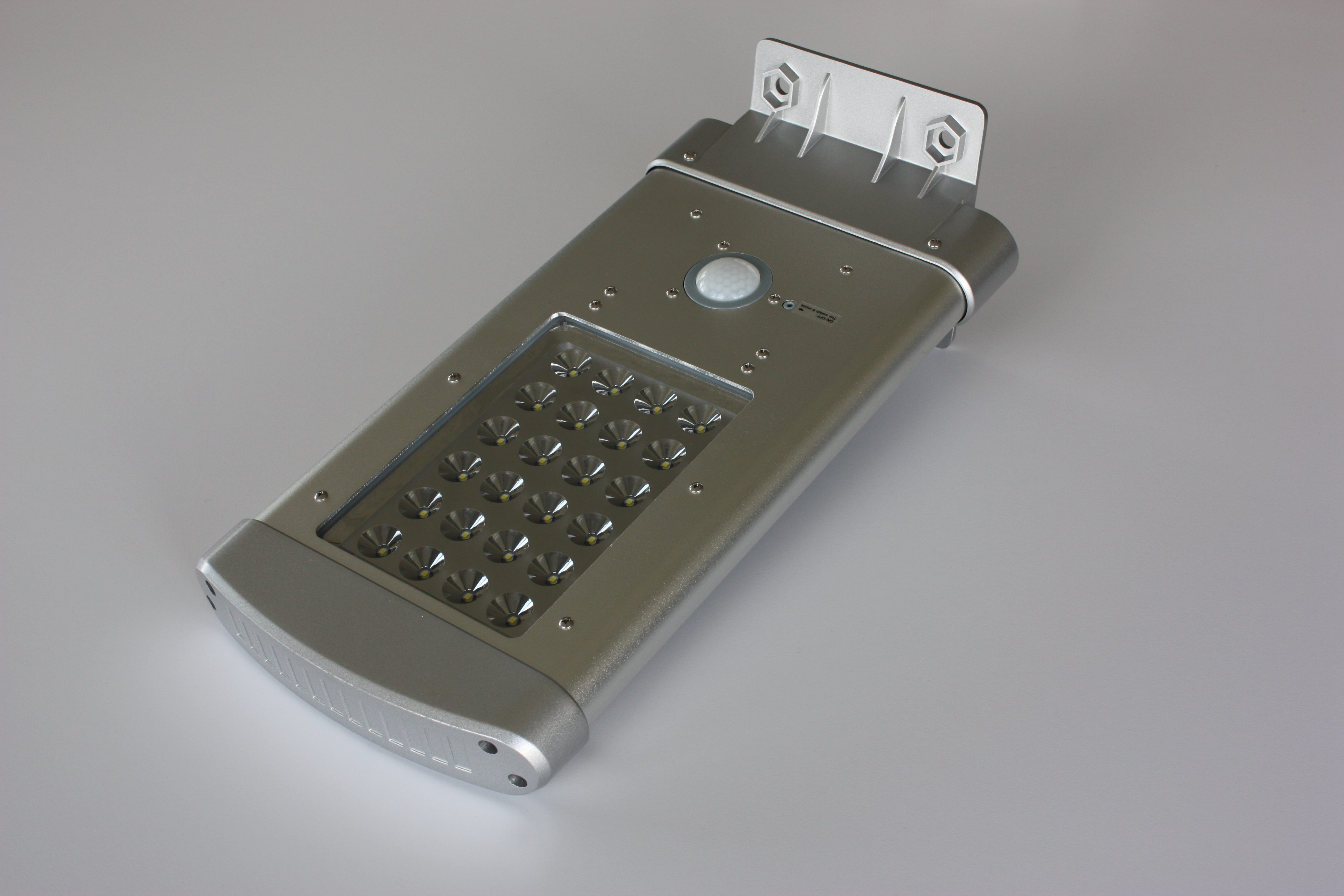 Solarstraßenbeleuchtung mit integriertem Solarmodul und Bewegungsmelder, Unterseite